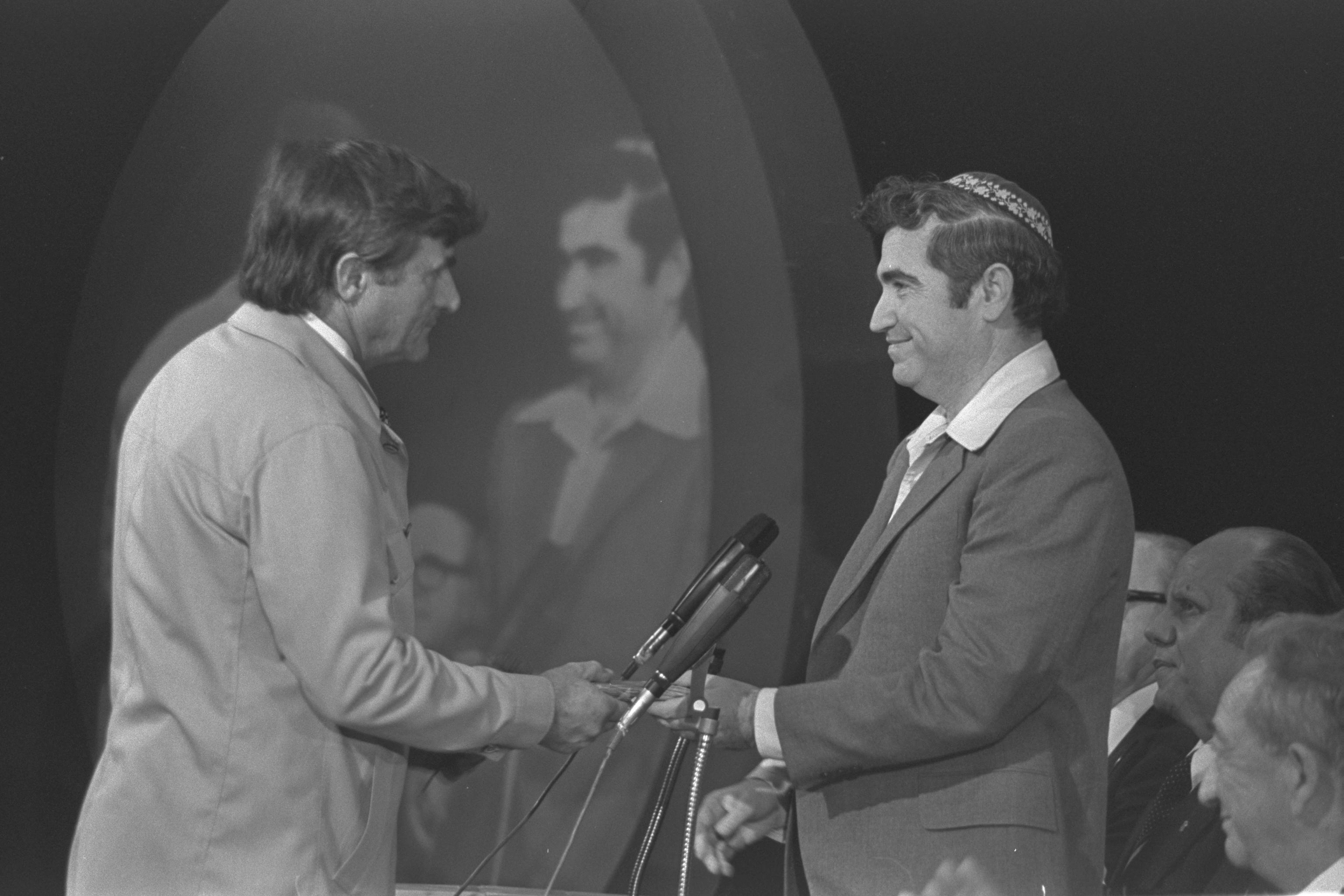 Soccer player Yehoshua Glazer receives a medal from Education Minister Zevulun Hammer as Outstanding Athlete for 1950. הכדורגלן יהושע גלזר מקבל מדליית ספורטאי מצטיין לשנת 1950 משר החינוך האמר.